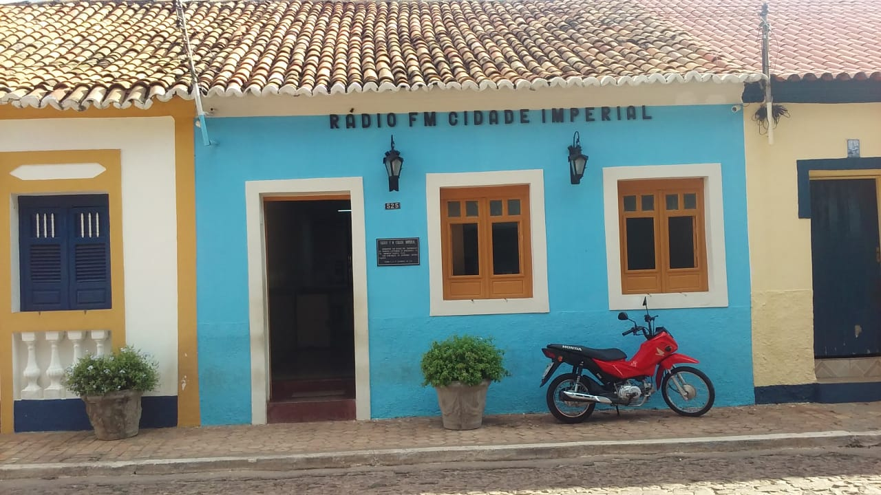 Casa história onde funciona a Rádio FM Cidade Imperial, em Pedro II, no estado brasileiro do Piauí.